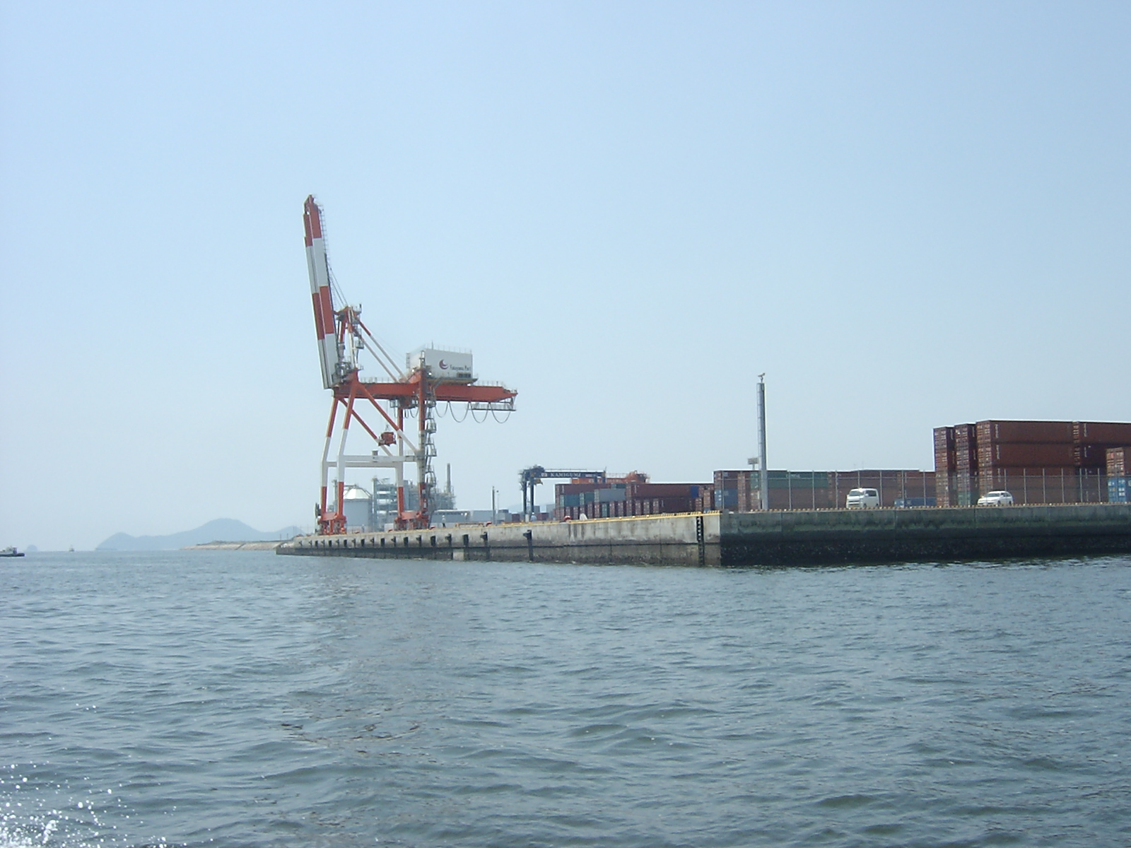 福山市簑島町・福山港国際コンテナターミナル